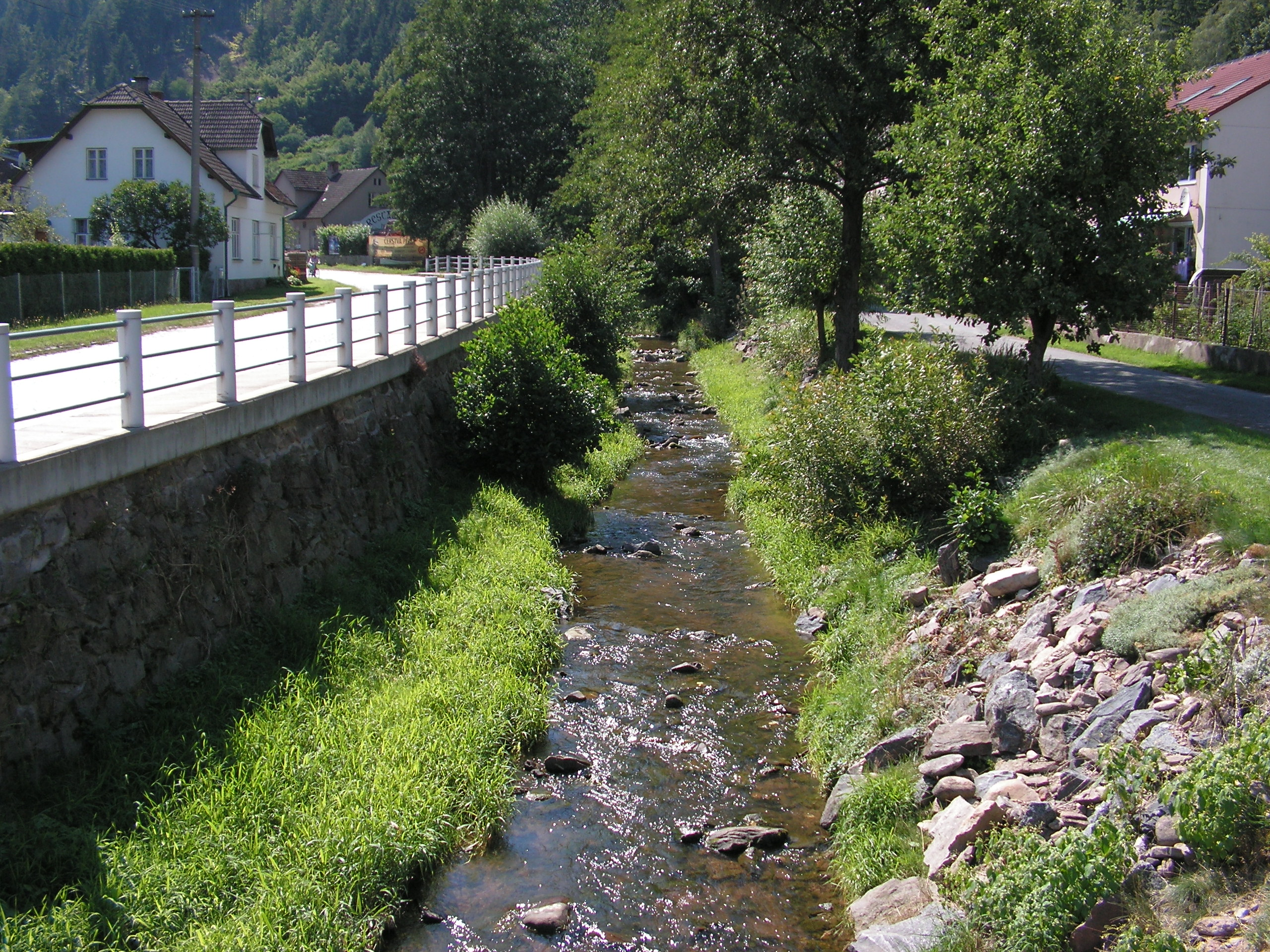 Říčka Bystřice nad ústím do řeky Svratky v obci Vír